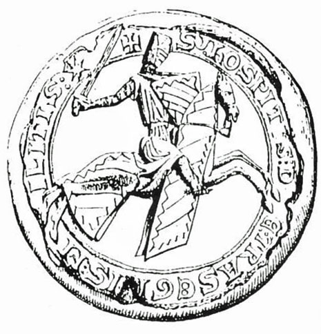 Sceau d'Othon III de Trazegnies